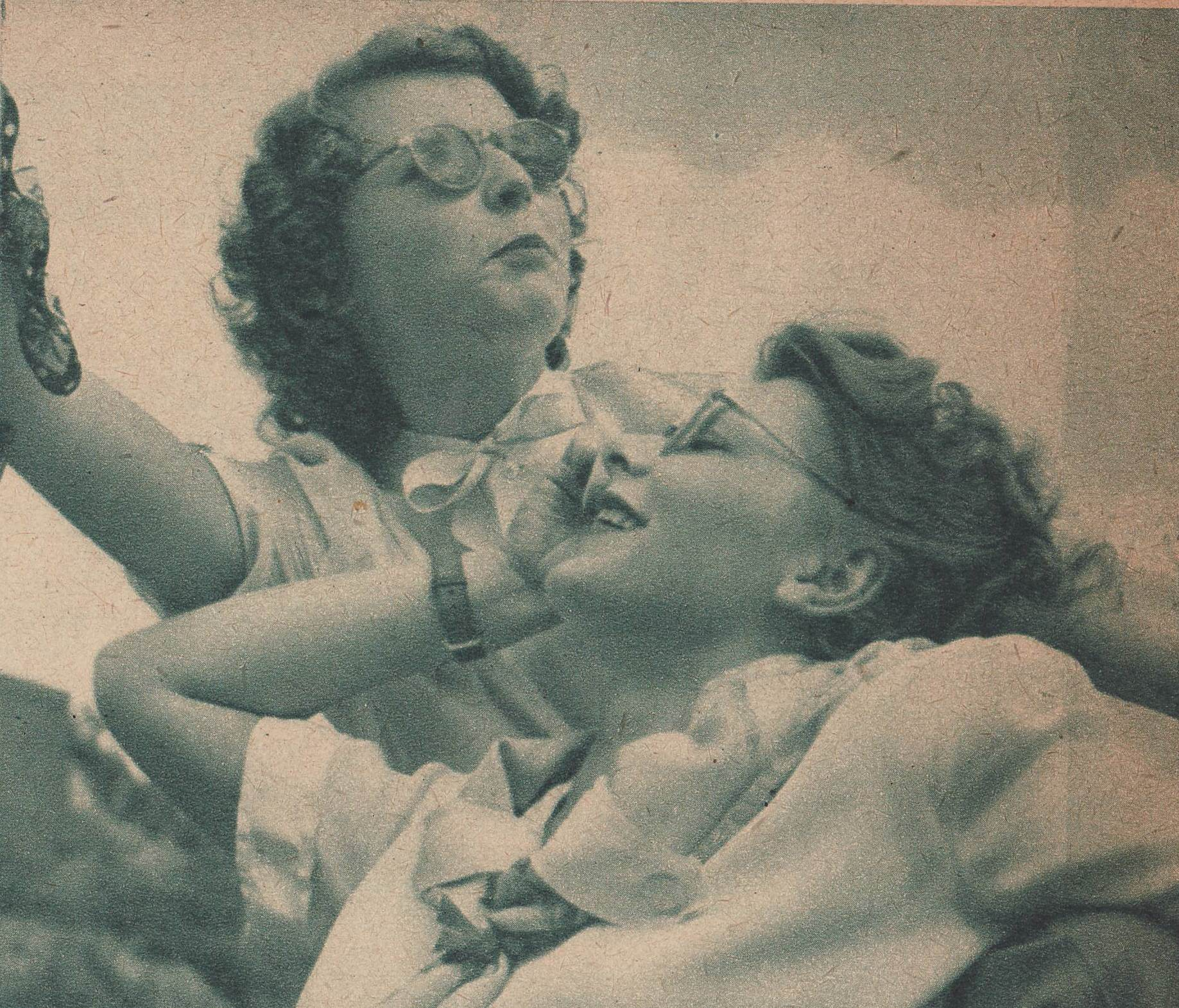 Barbara Drapińska & Jiřina Petrovická